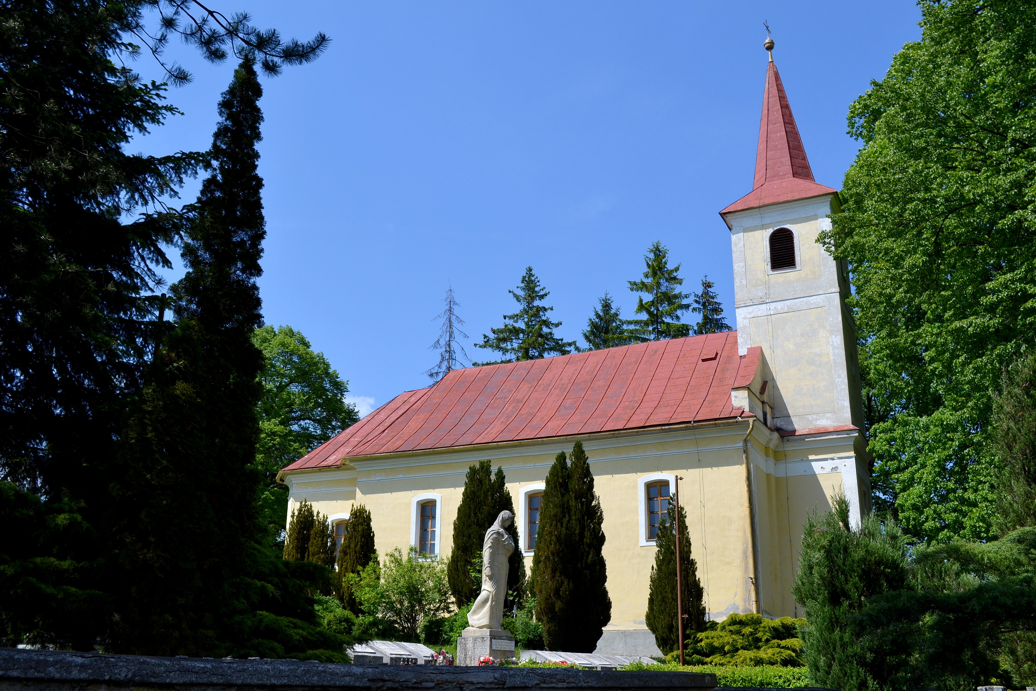 Kosorín (okr. Žiar nad Hronom), Kostol svätého Ladislava; celkový pohľad